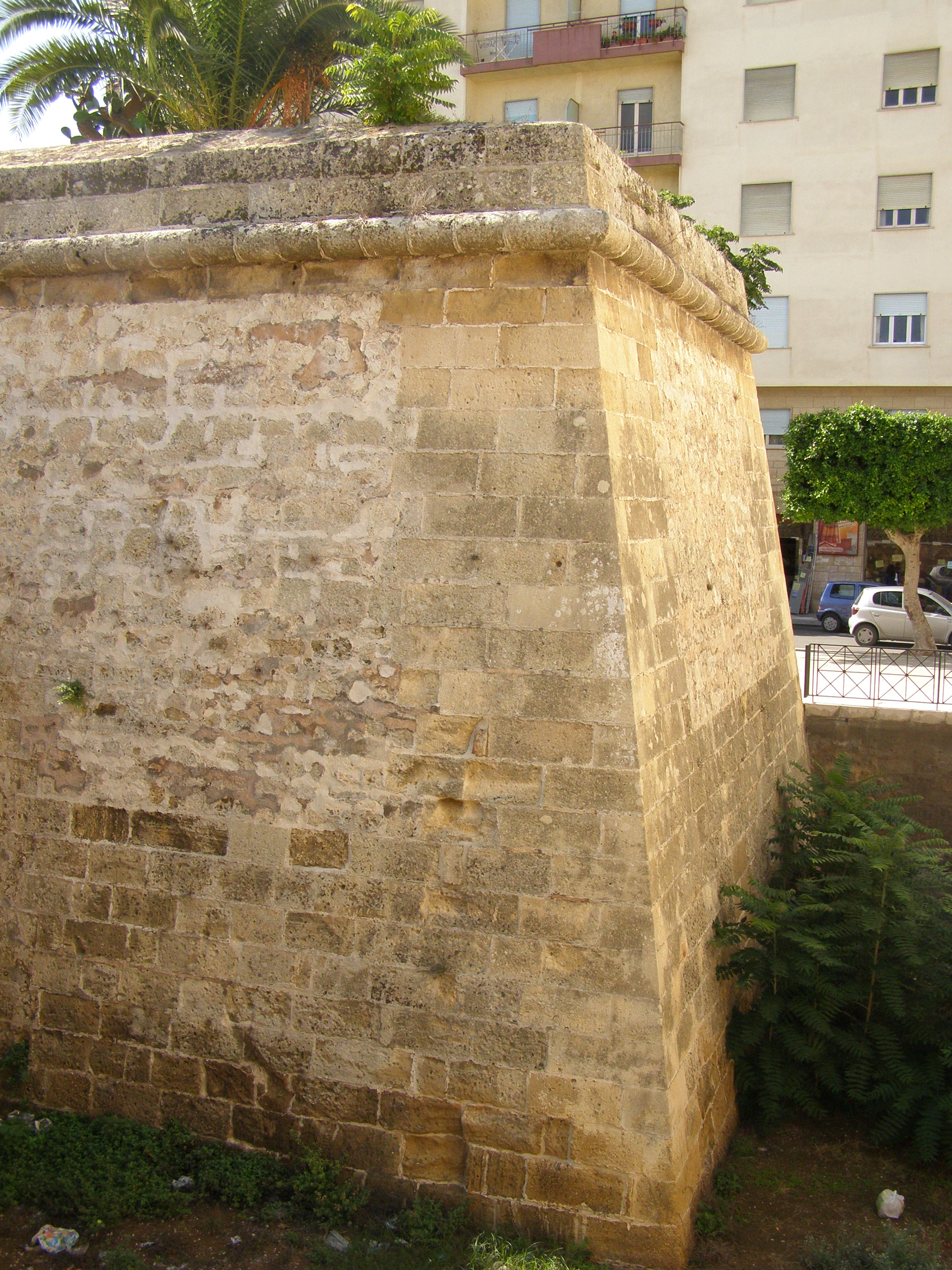 Marsala, Baluardo Velasco, parte del sistema difensivo della città realizzato nel XVI secolo.